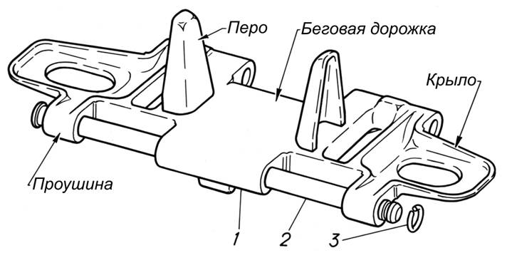 Звено гусеницы ОШ (применяется на снегоболотоходах ГАЗ34039)